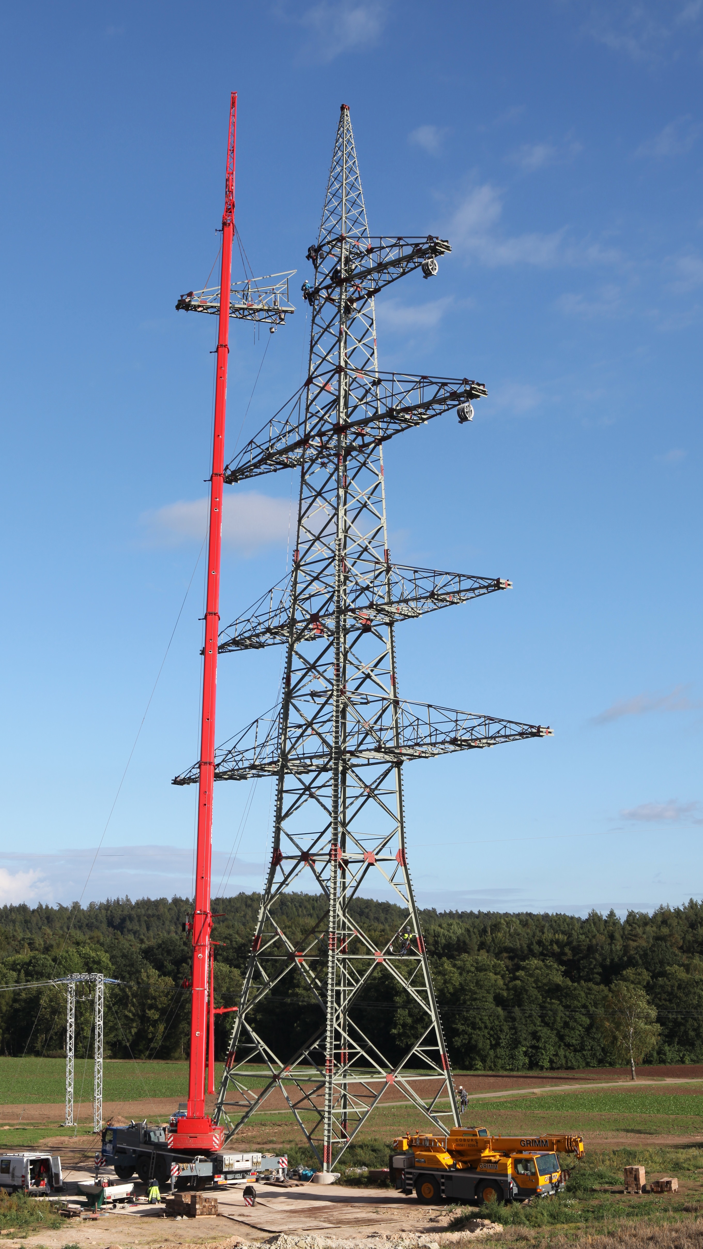 Thüringer Strombrücke (380 kV) bei Neu- und Neershof (Coburg, Bayern), Montage Winkelabzweigmast mit zusäzlicher Traverse für Anschluss 110-kV-Leitung nach Neustadt bei Coburg; links Provisorium